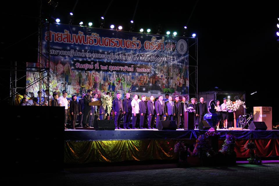 สายสัมพันธ์วันครอบครัว ครั้งที่ 11 โรงเรียนสันป่าตองวิทยาคม